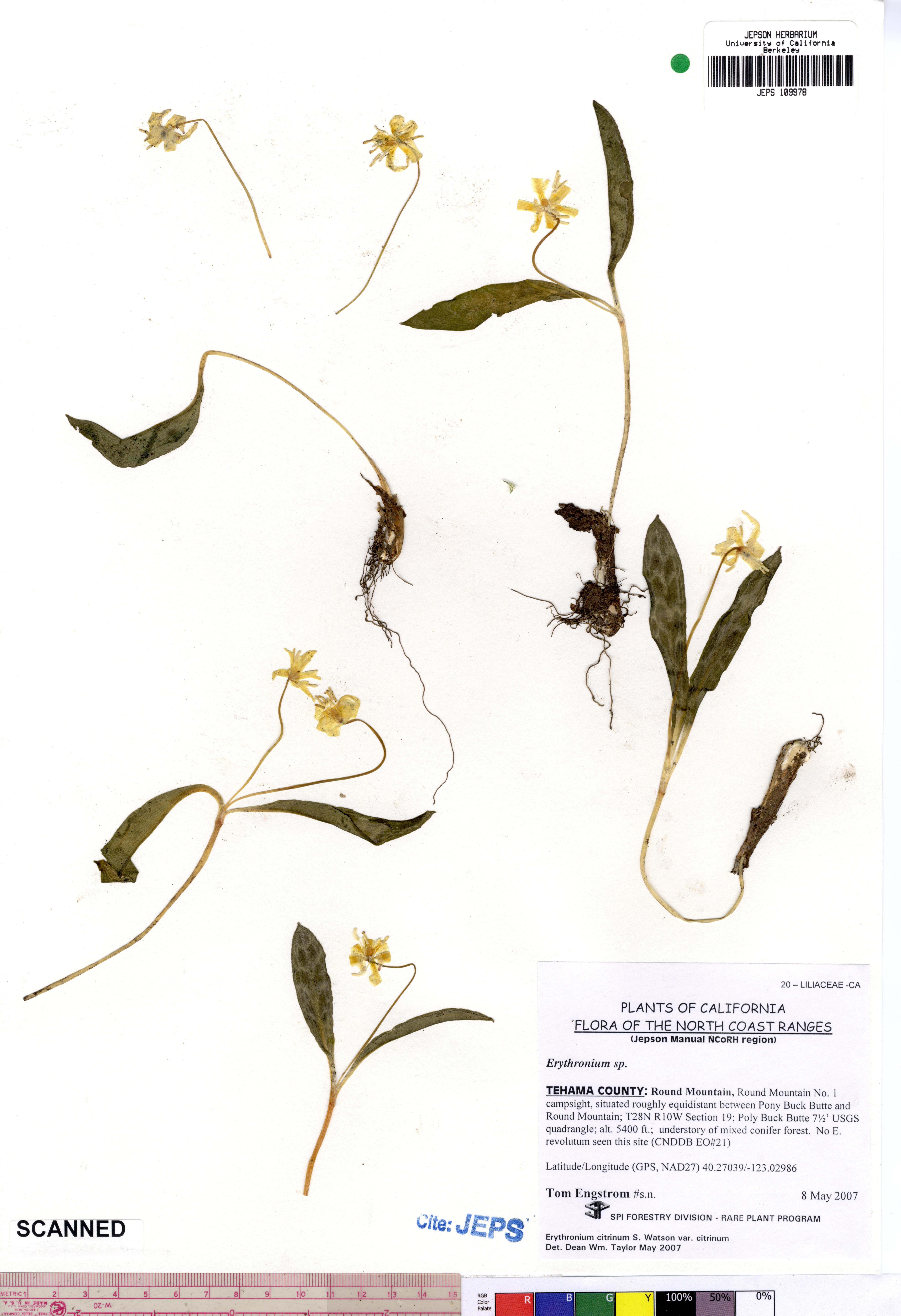 Erythronium citrinum var. citrinum JEPS109978